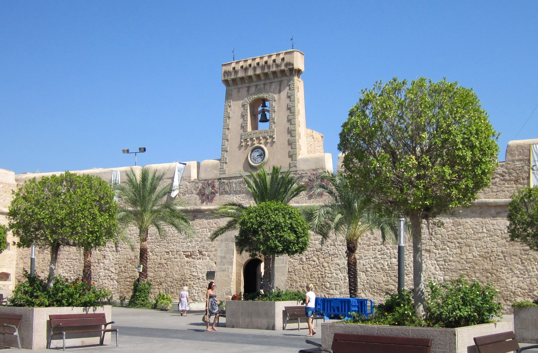 Castell de Santa Pola